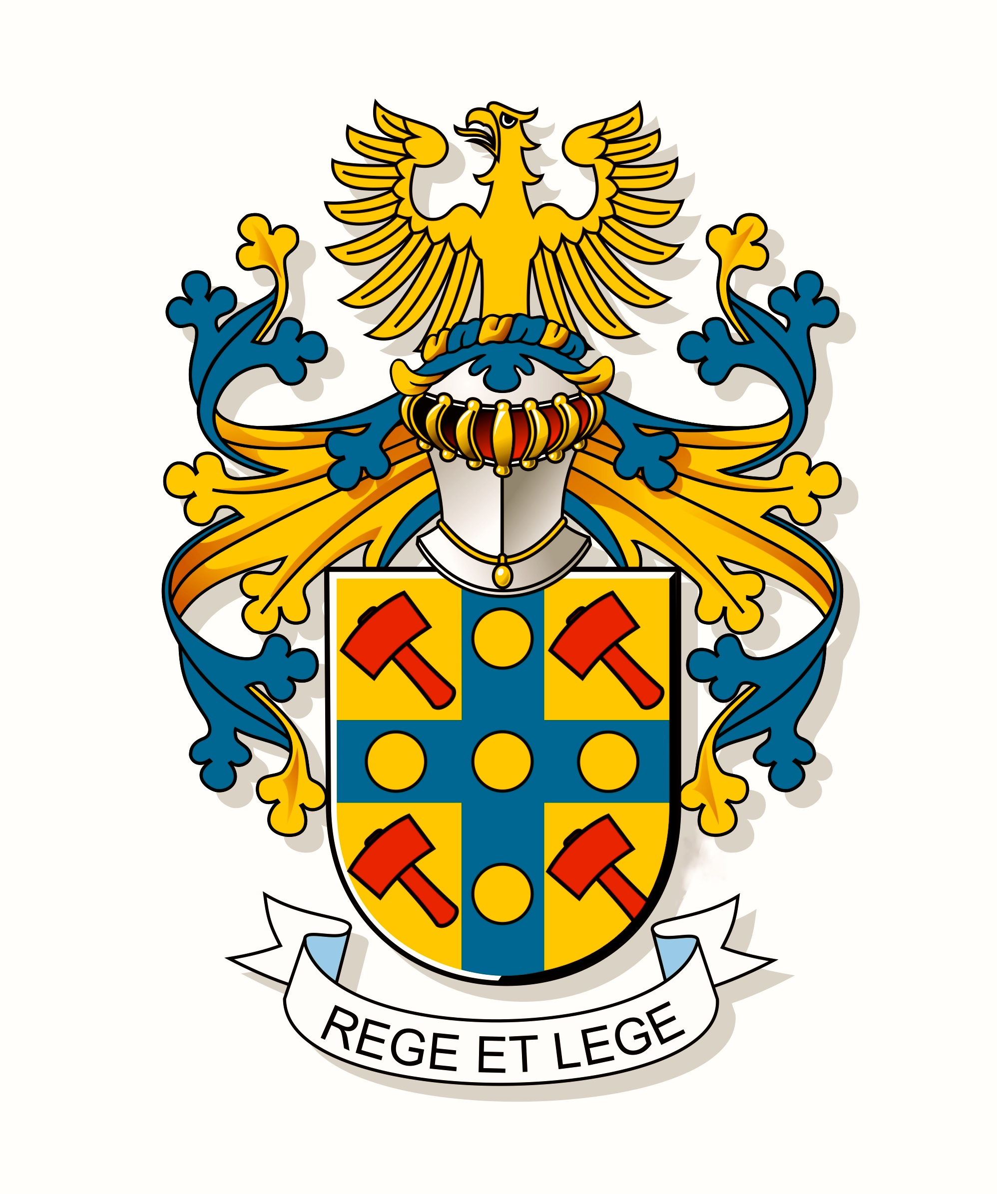 d'or, à la croix d'azur, chargée de cinq besants d'or, et accompagnée de quatre maillets de gueules. │ L'écu surmonté d'un heaume d'argent, grillé, colleté et liseré d'or, doublé et attaché de gueules, aux bourrelet et lambrequins d'or et d'azur. Cimier: une aigle éployée d'or issante. Devise: 'Rege et lege.